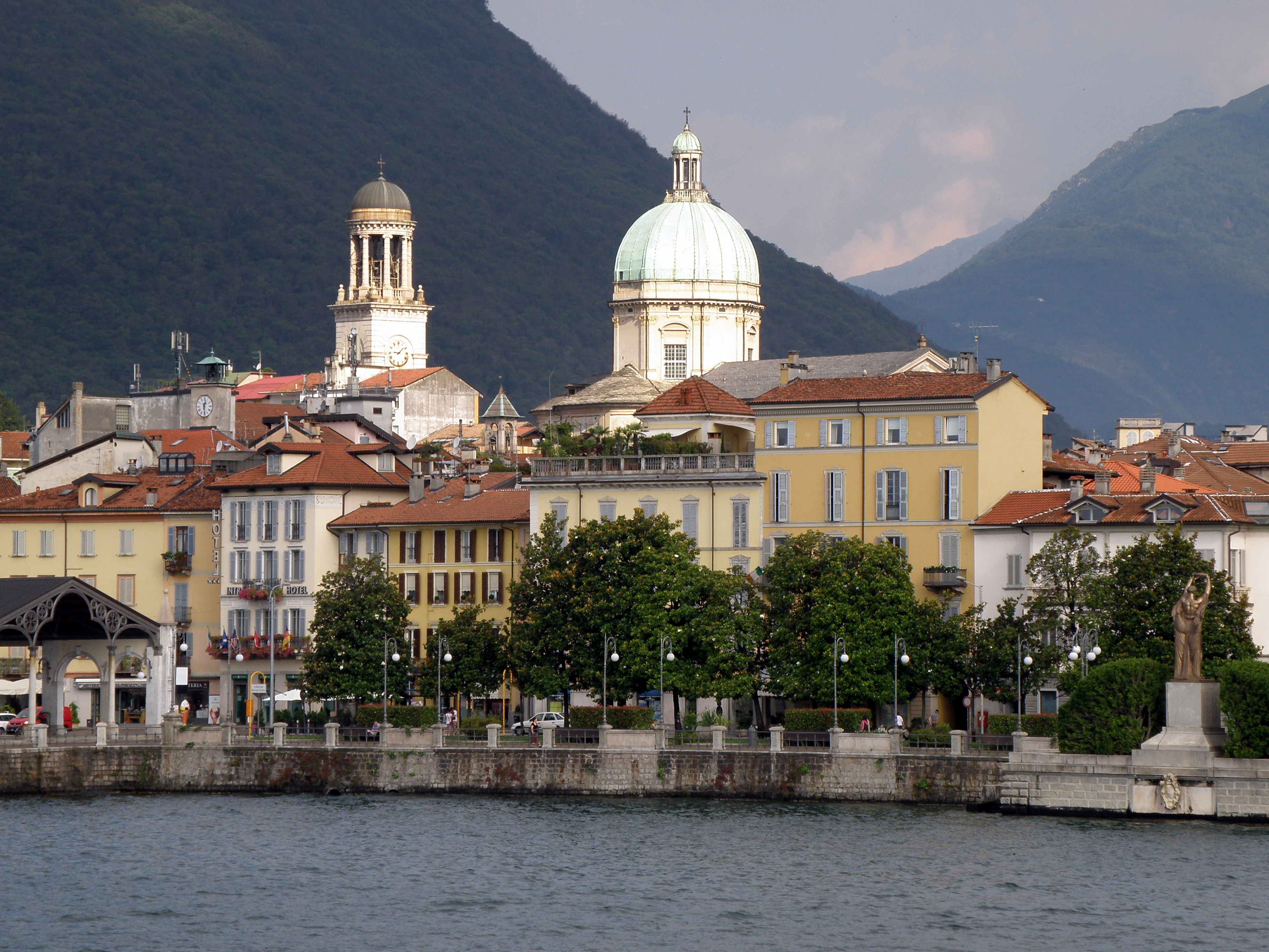 Verbania (VB). Veduta dal traghetto Laveno-Verbania.